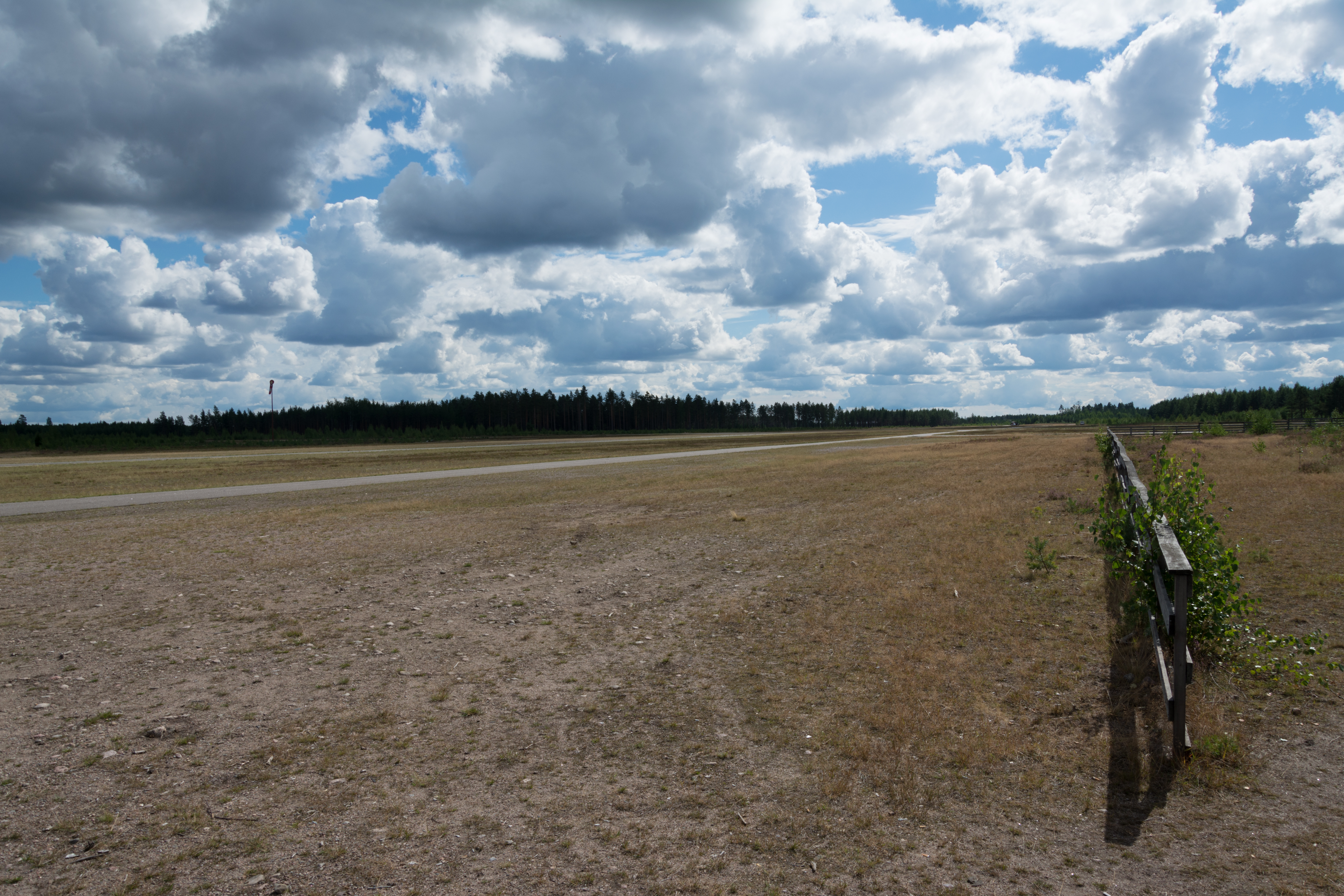 Kiikalan lentokenttä, Salo